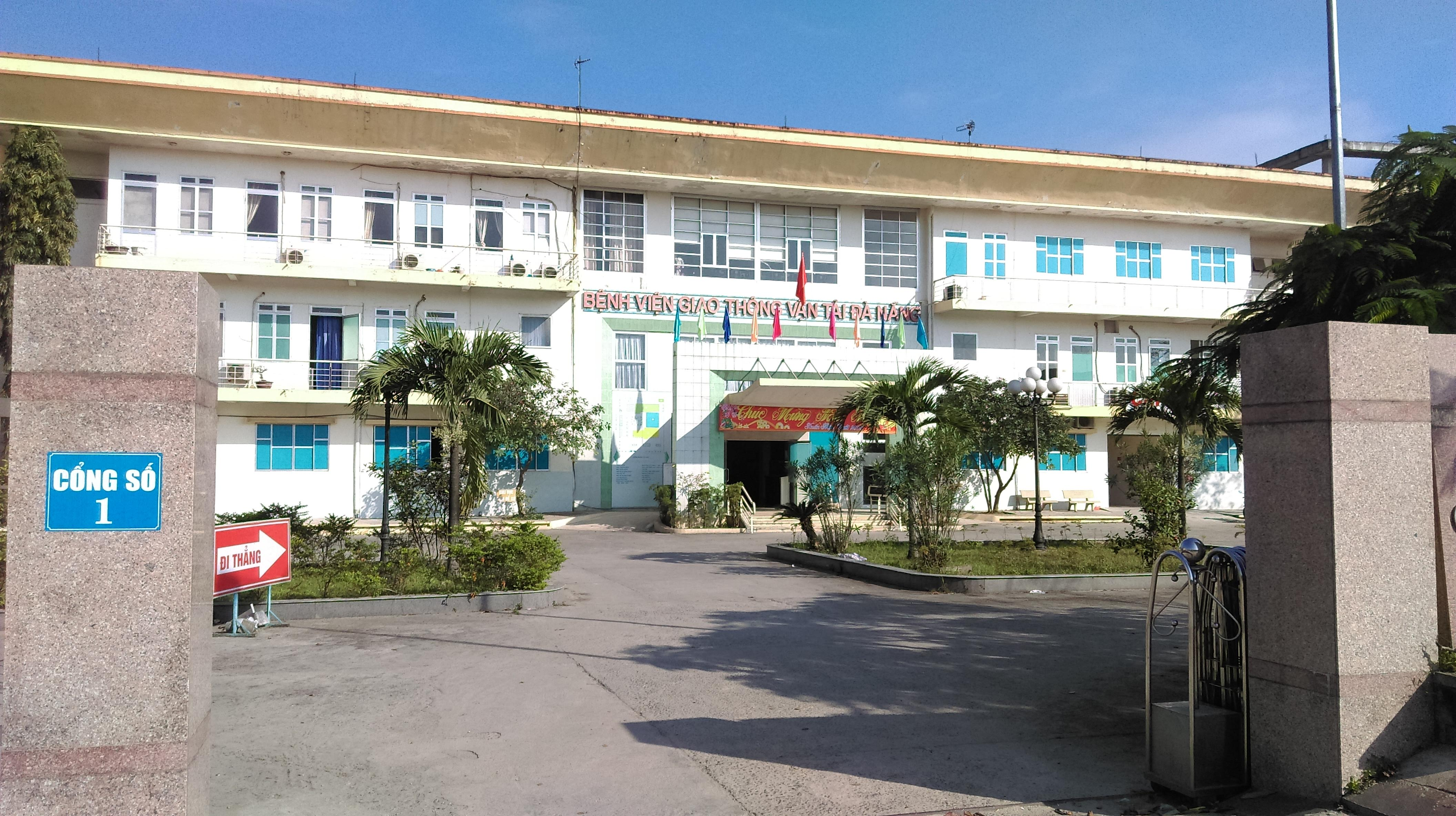 Bệnh viện Giao thông Vận tải Đà Nẵng